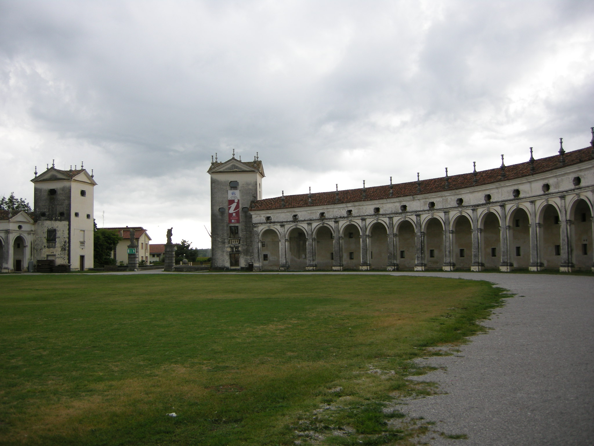 Villa manin, esedra